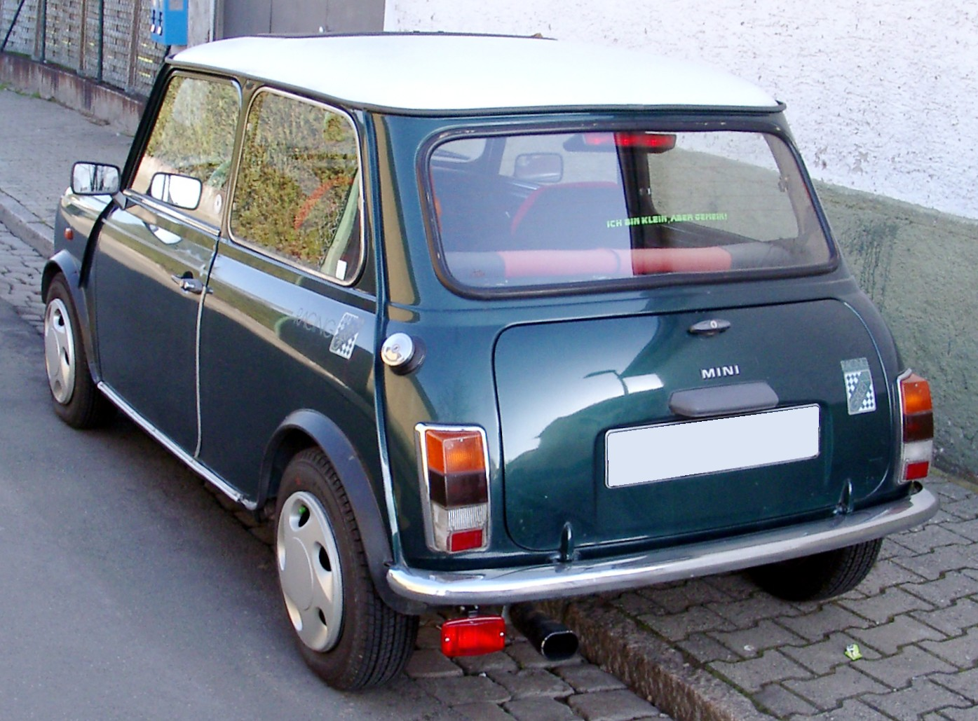 Mini